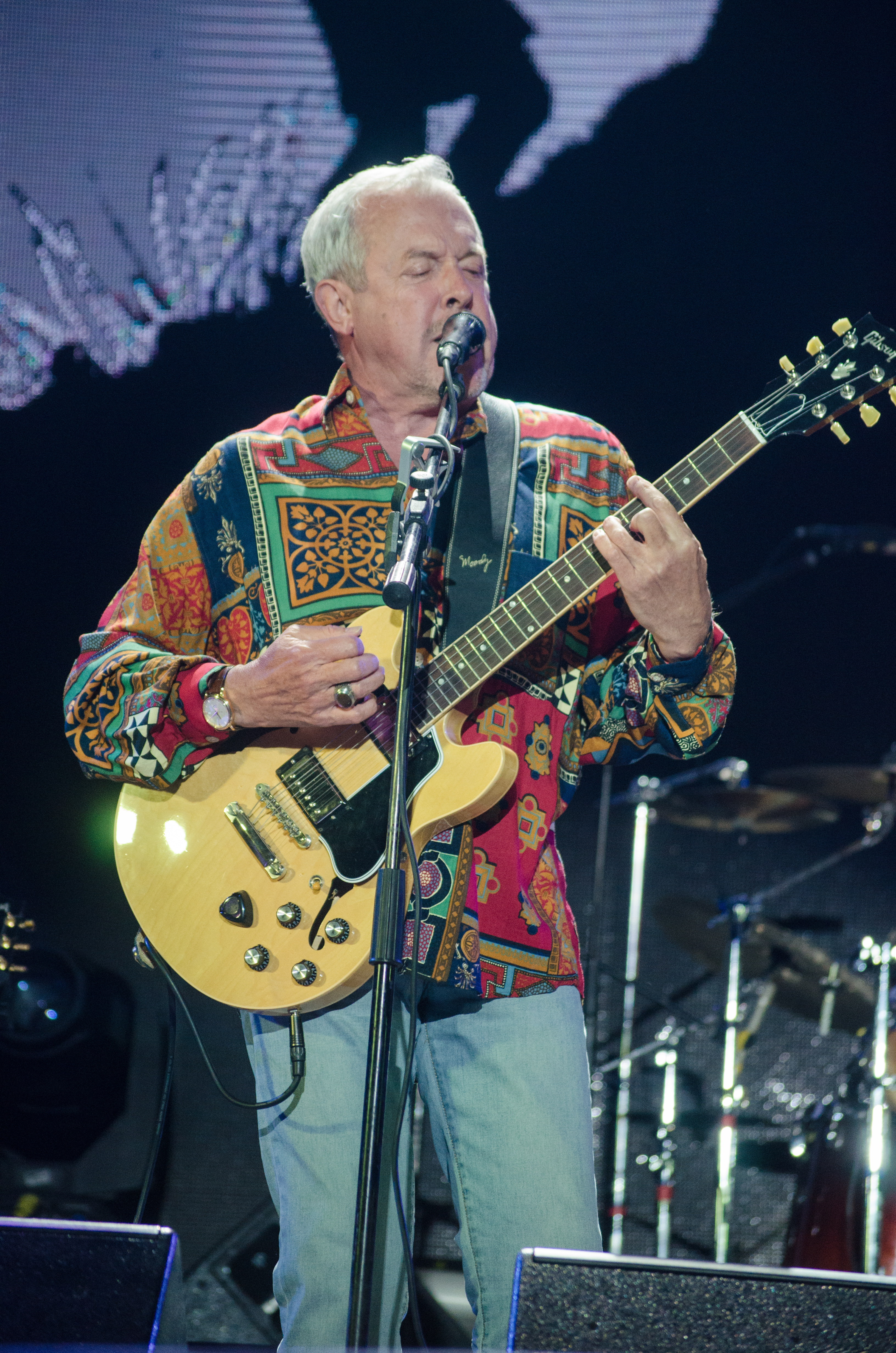 Андрей Макаревич, Atlas Weekend 2016.